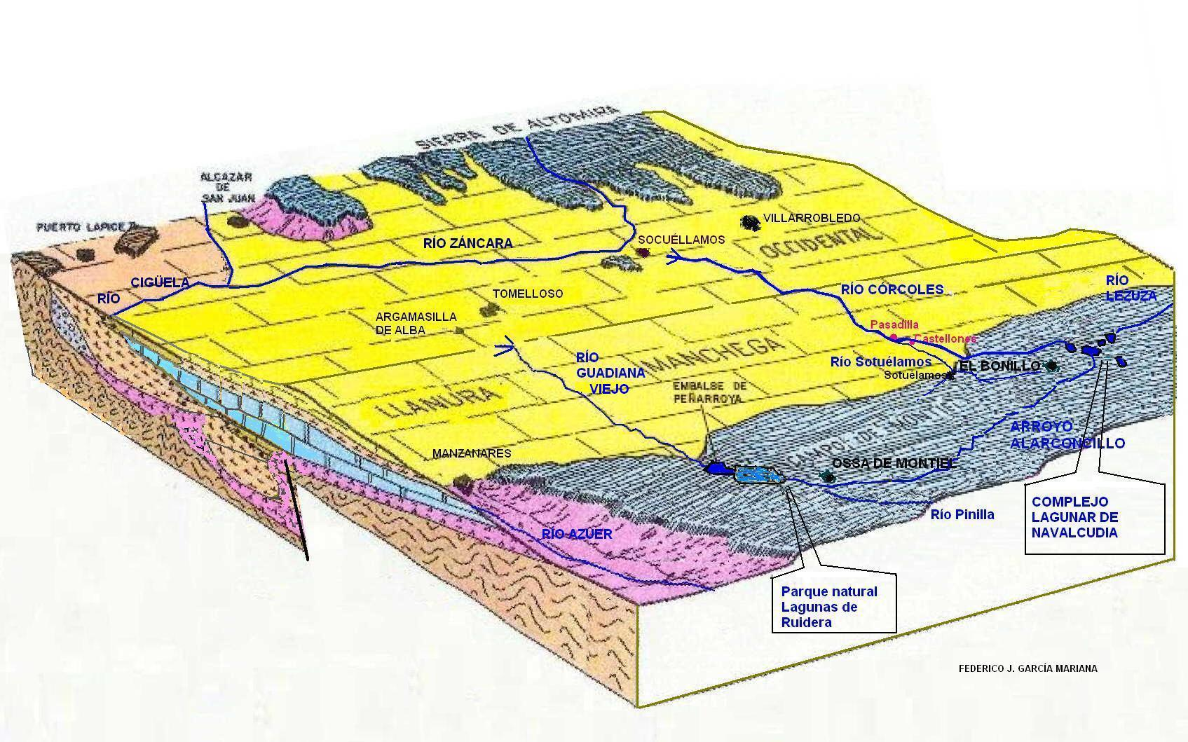 Bloque diagrama de la cuenca alta del río Guadiana (La Mancha, España) con sus ríosafluentes endorreicos ("libres"). Zonas de recarga